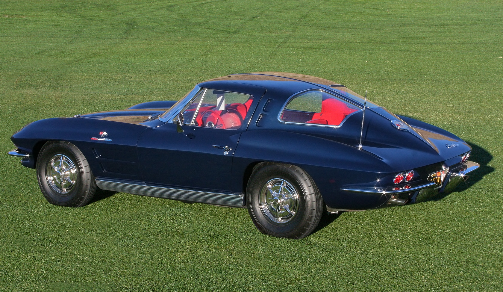 1963 Chevrolet Corvette - rvl